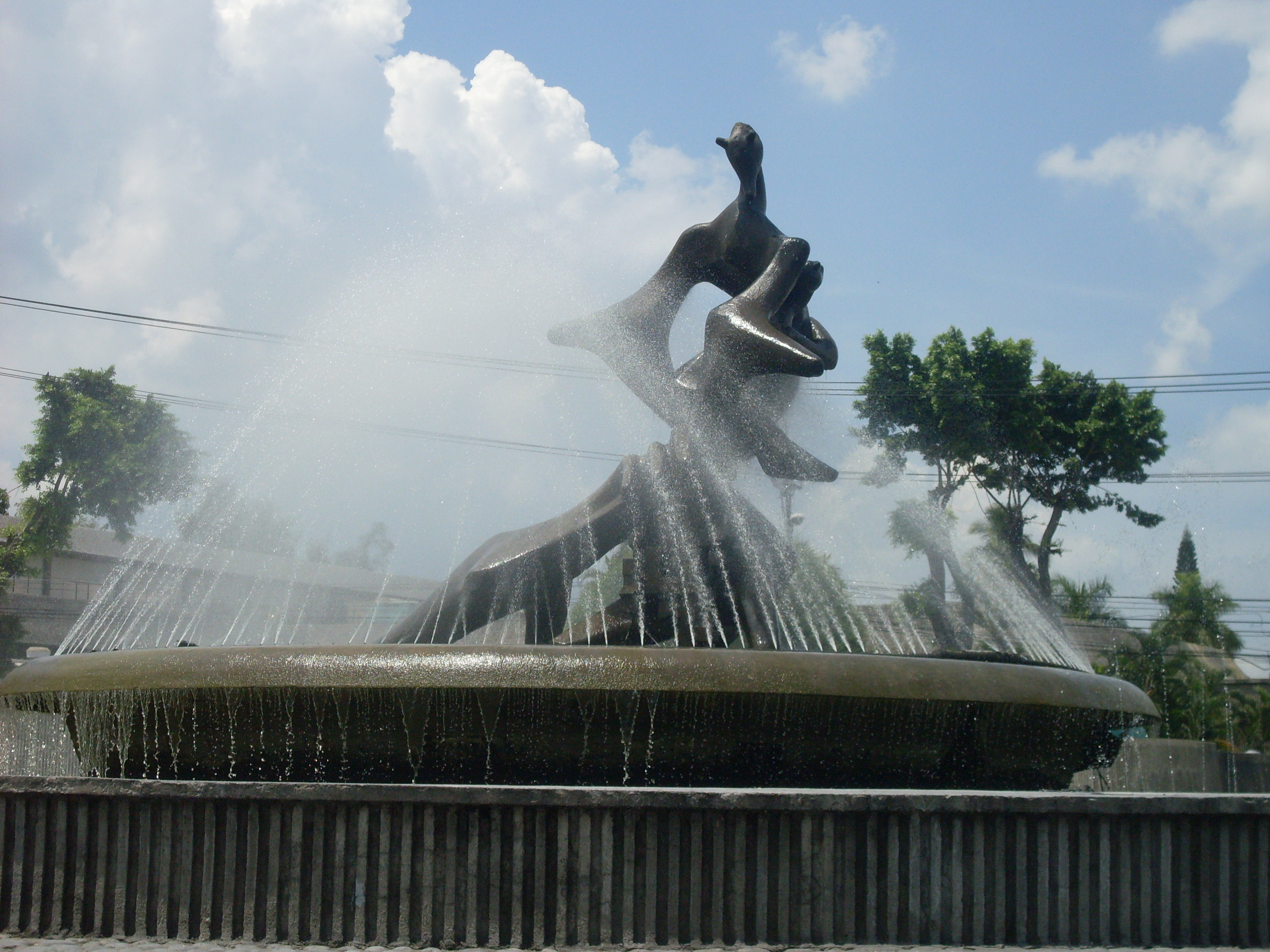 Monumento al Mar conocido como "La Fuente Luminosa"